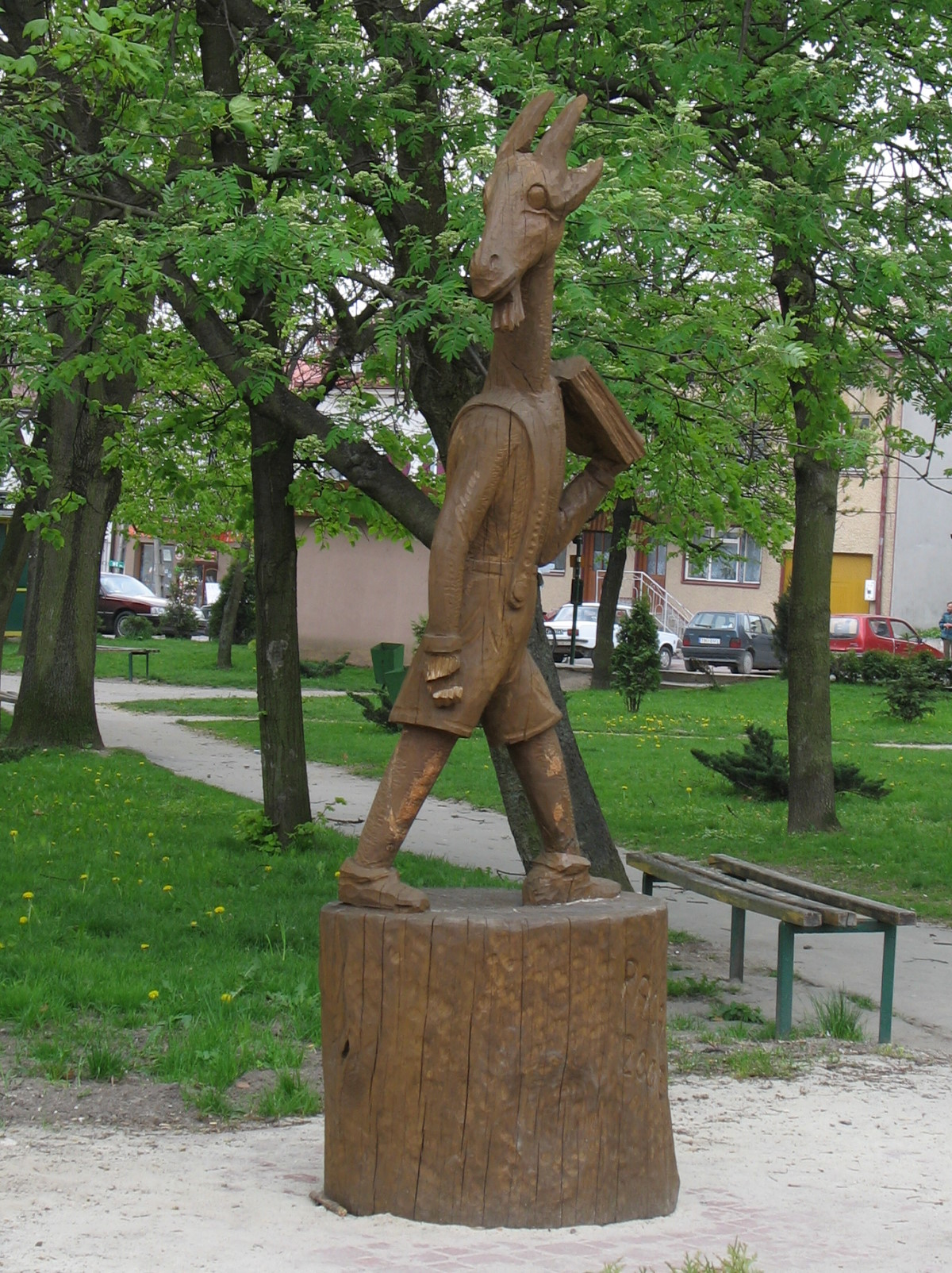 Pacanów, pomnik Koziołka Matołka Pacanów, monument of Koziołek Matołek Photo taken by Wikipedysta:Wp and uploaded to Polish Wikipedia on 15:49, 1 July 2006. Transferred to Commons by Piotr Konieczny aka Prokonsul Piotrus Talk 01:15, 8 September 2006 (UTC).